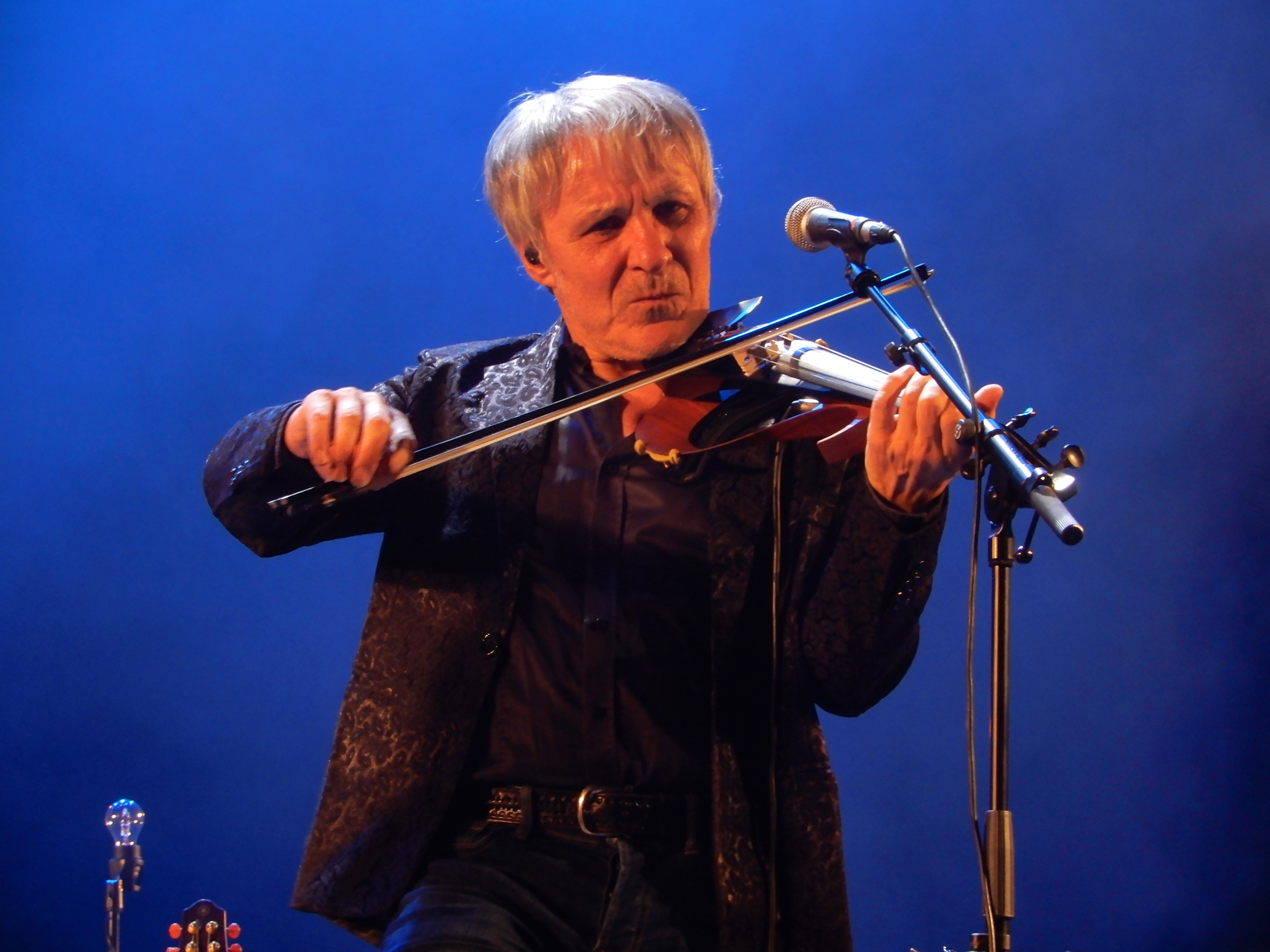 Pierre Sangra de Red Cardell en concert à Bruz en mai 2019.